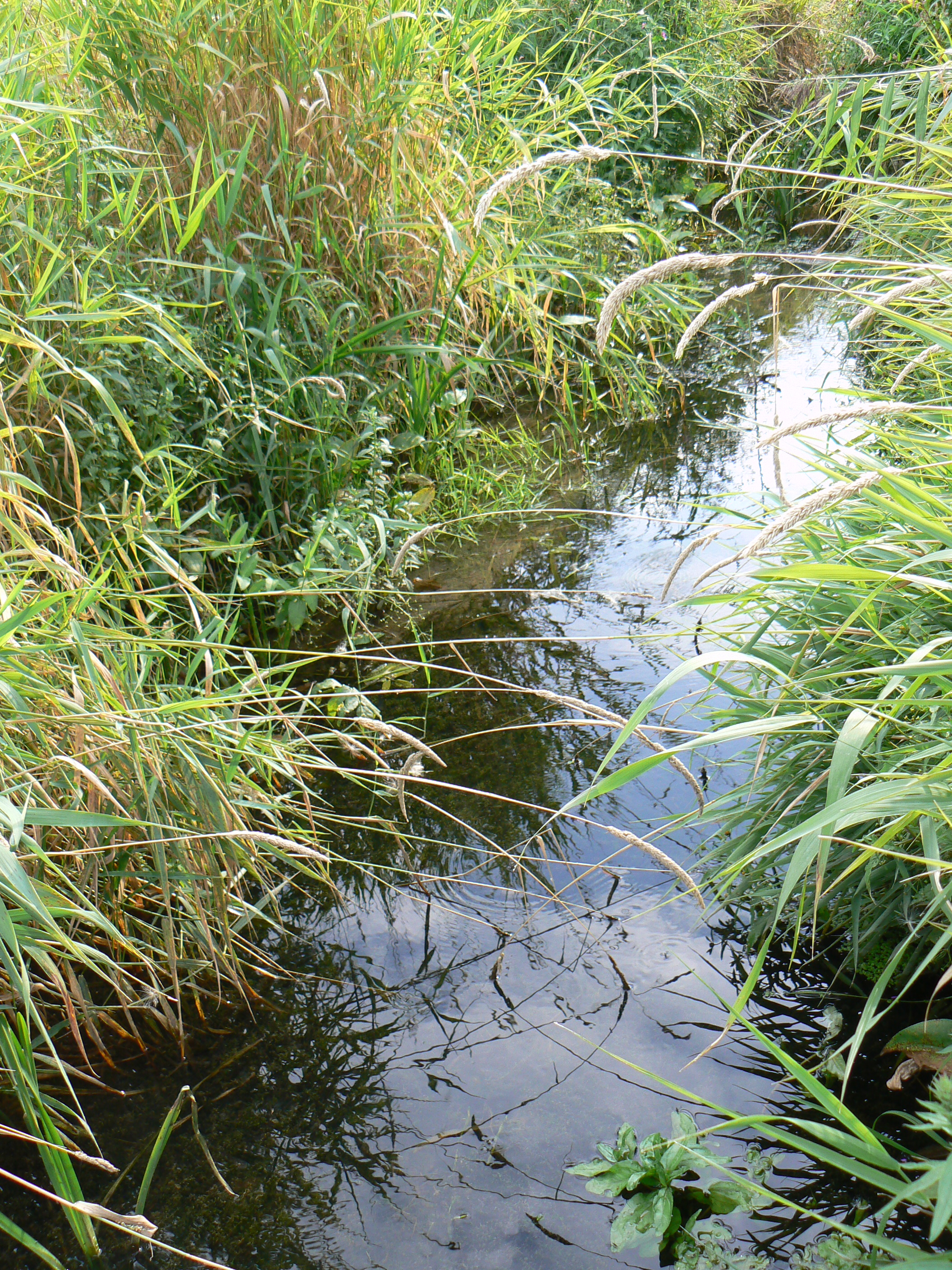 Cypa ve vsi Karklė. Pohled po proudu, t.j. od východu